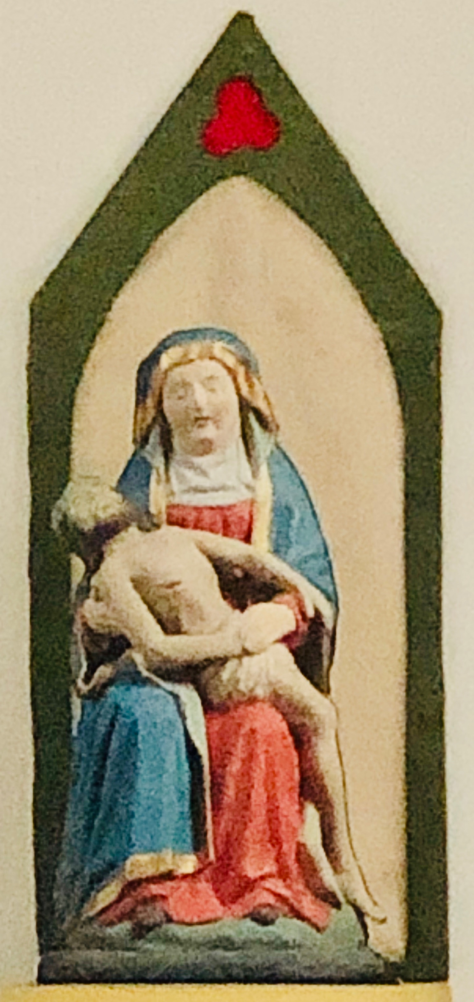 Pieta aus der Ahekapelle, St. Servatius in Engelgau, Nettersheim, Deutschland